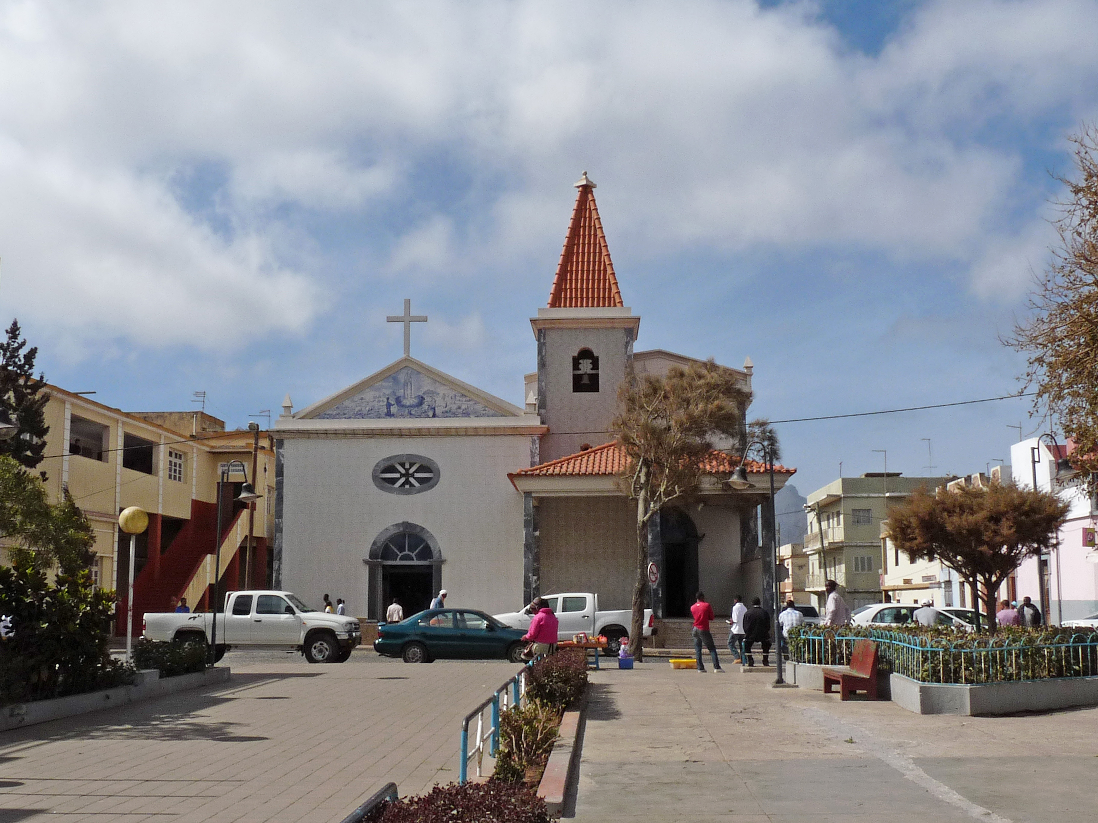 Igreja de Nossa Senhora de Fátima à Assomada (île de Santiago, Cap-Vert)